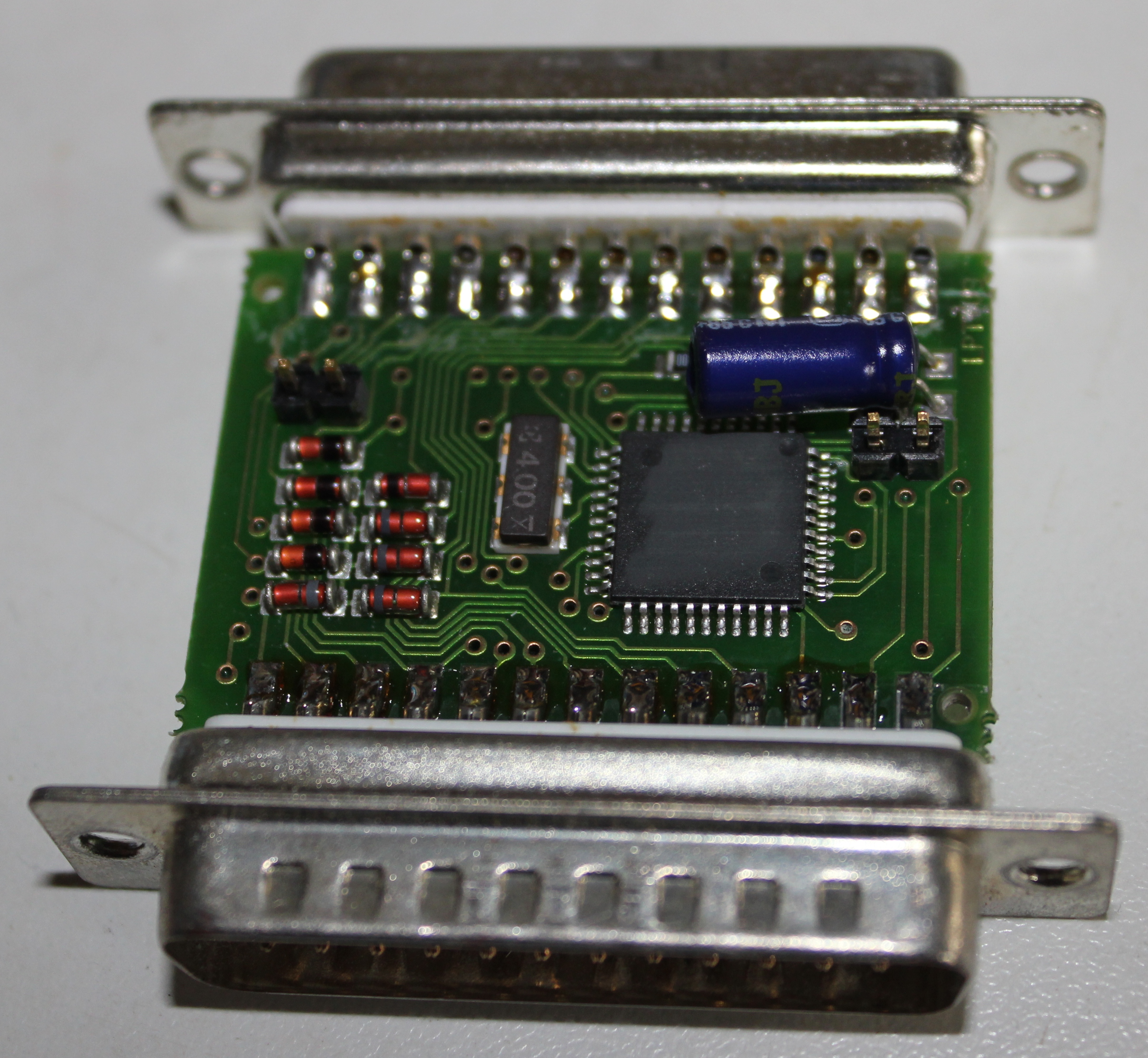 Dongle LPT - Vue en Macro du dessus